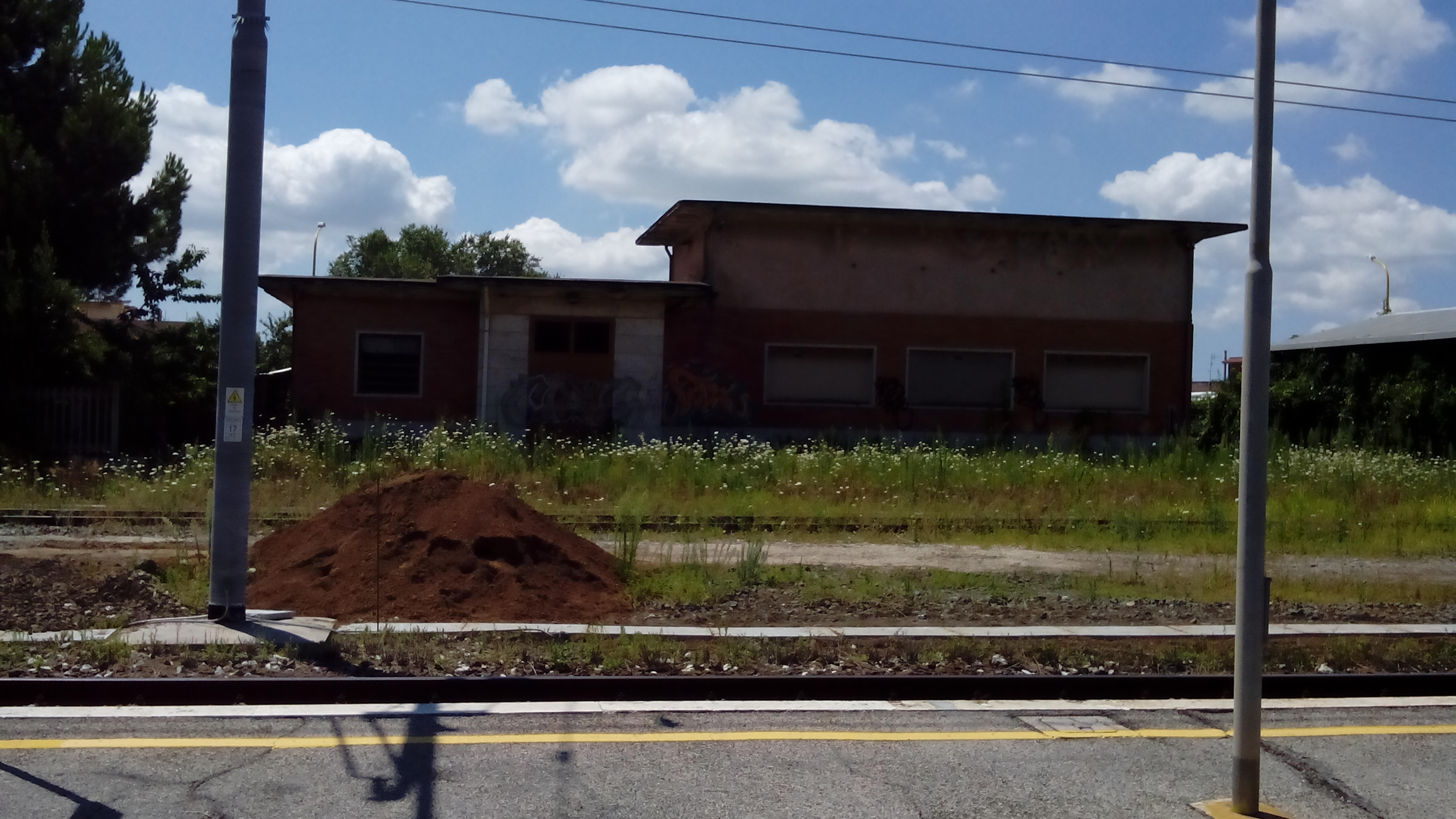 Fabbricati in disuso della ex stazione di Cecchina Genzano.